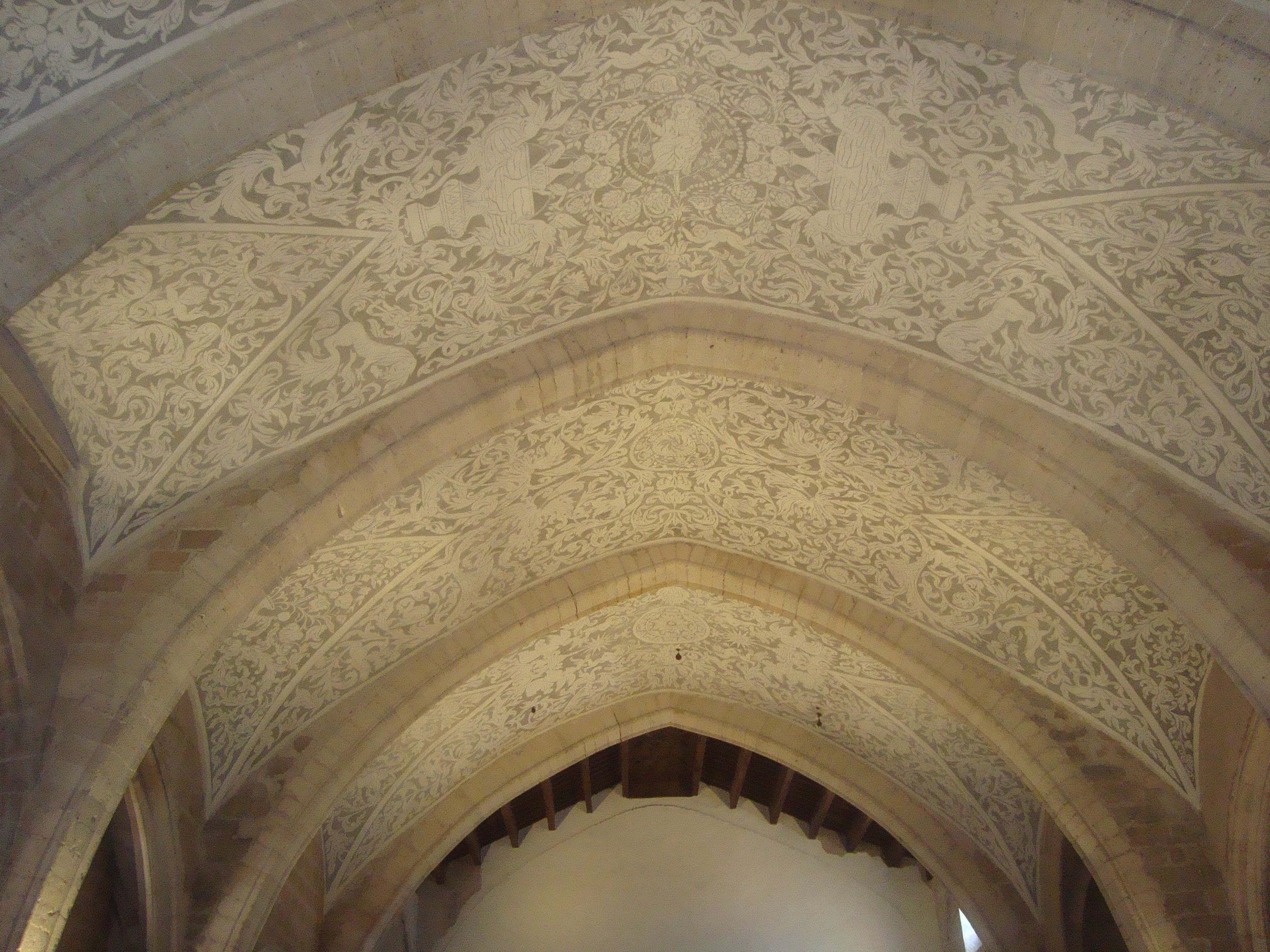 Iglesia Parroquial de la Asunción de María 02.042-007.